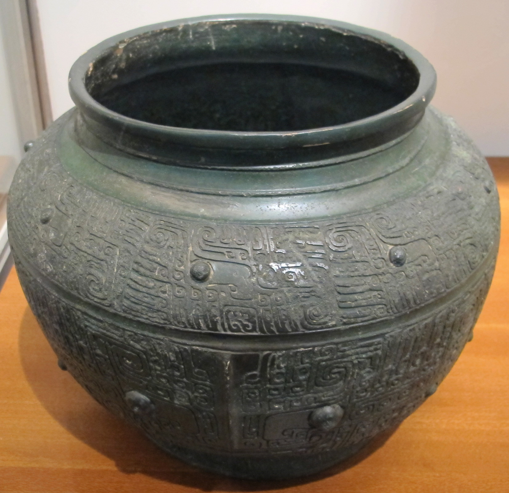 Dinastia shang, giara pou, cina del nord, xvi-xiii sec. ac.